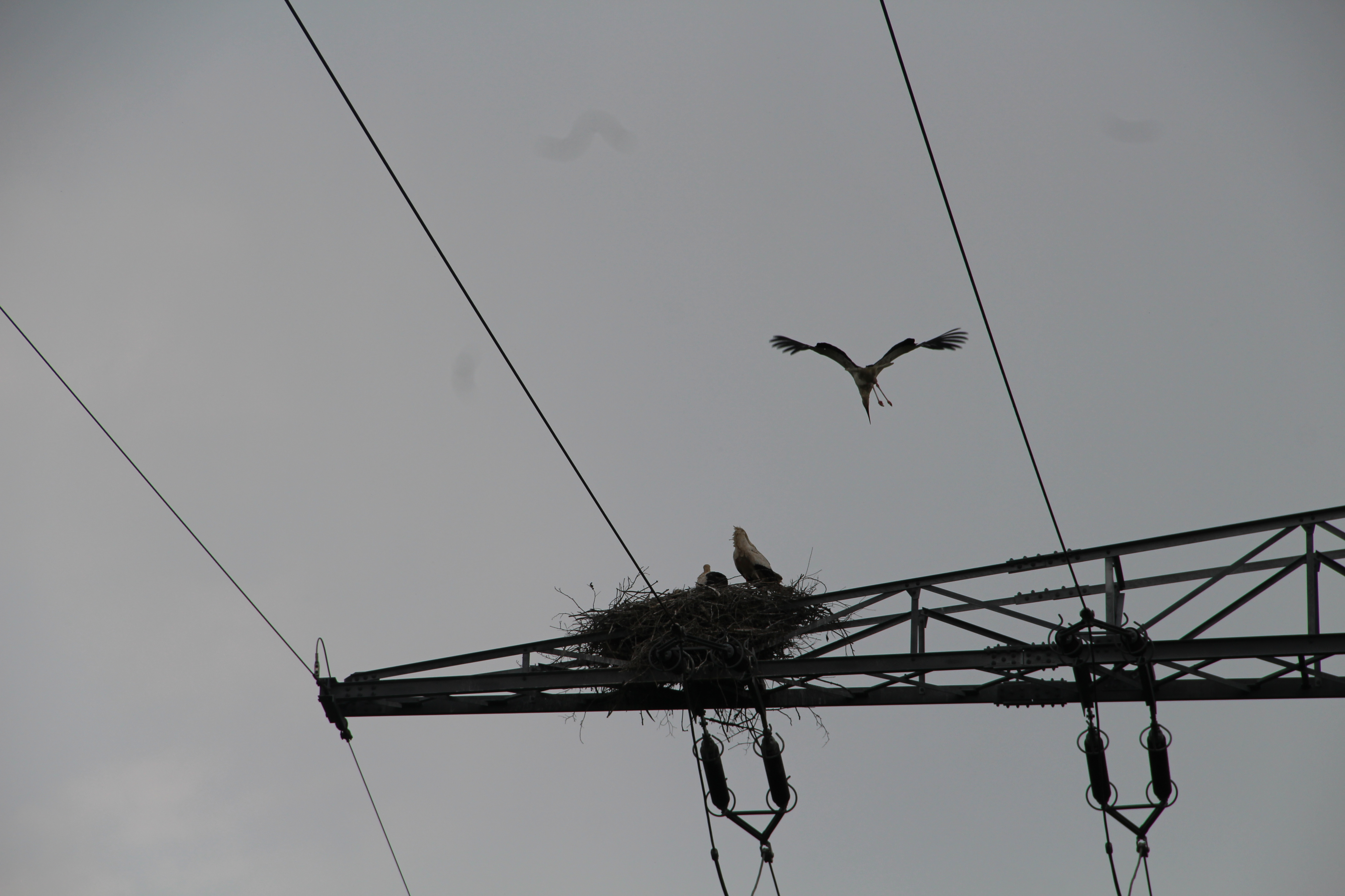 Storchnest auf einen Hochspannungsmast nahe dem SAP-Gelände